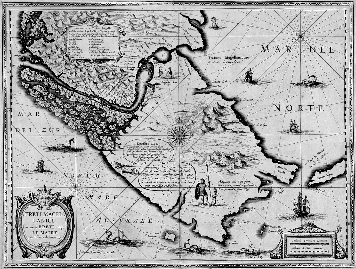 Description: A map of Strait of Magellan and Tierra del Fuego. Freti Magellanici ac novi Freti vulgó Le Maire exactissima delineatio. / Afbeelding der Strae Magellanes, So als de selve van M.rBarent Iansz. Potgieter van Munster door en weder door bevaren en met syn Capiteyn Sebald de Waerd met groot pericul syns levens seer naerstig ondersocht is. / Judocus Hondius excudit. / DGriip Sculp.